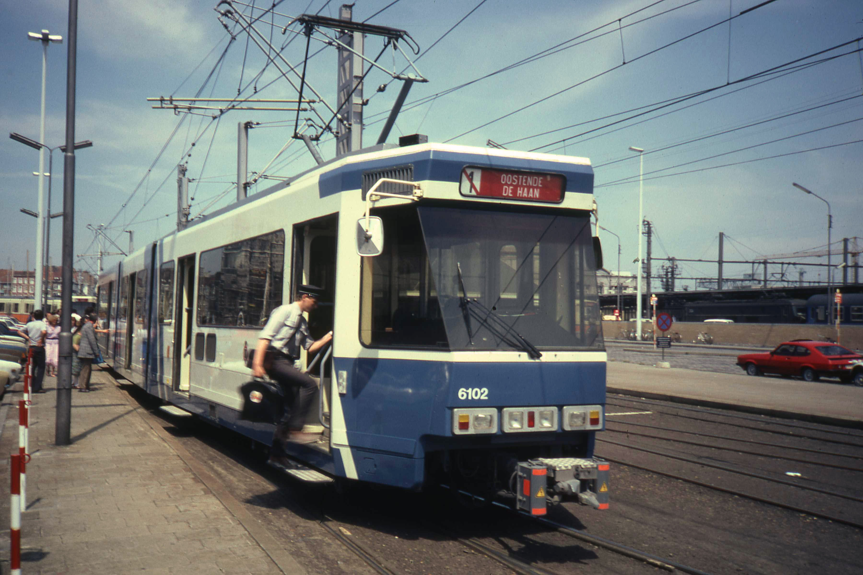 Verlengde BN 6102 tram. Dit experiment is niet vervolgd. De vloerhoogte is standaard voor het extra deel.